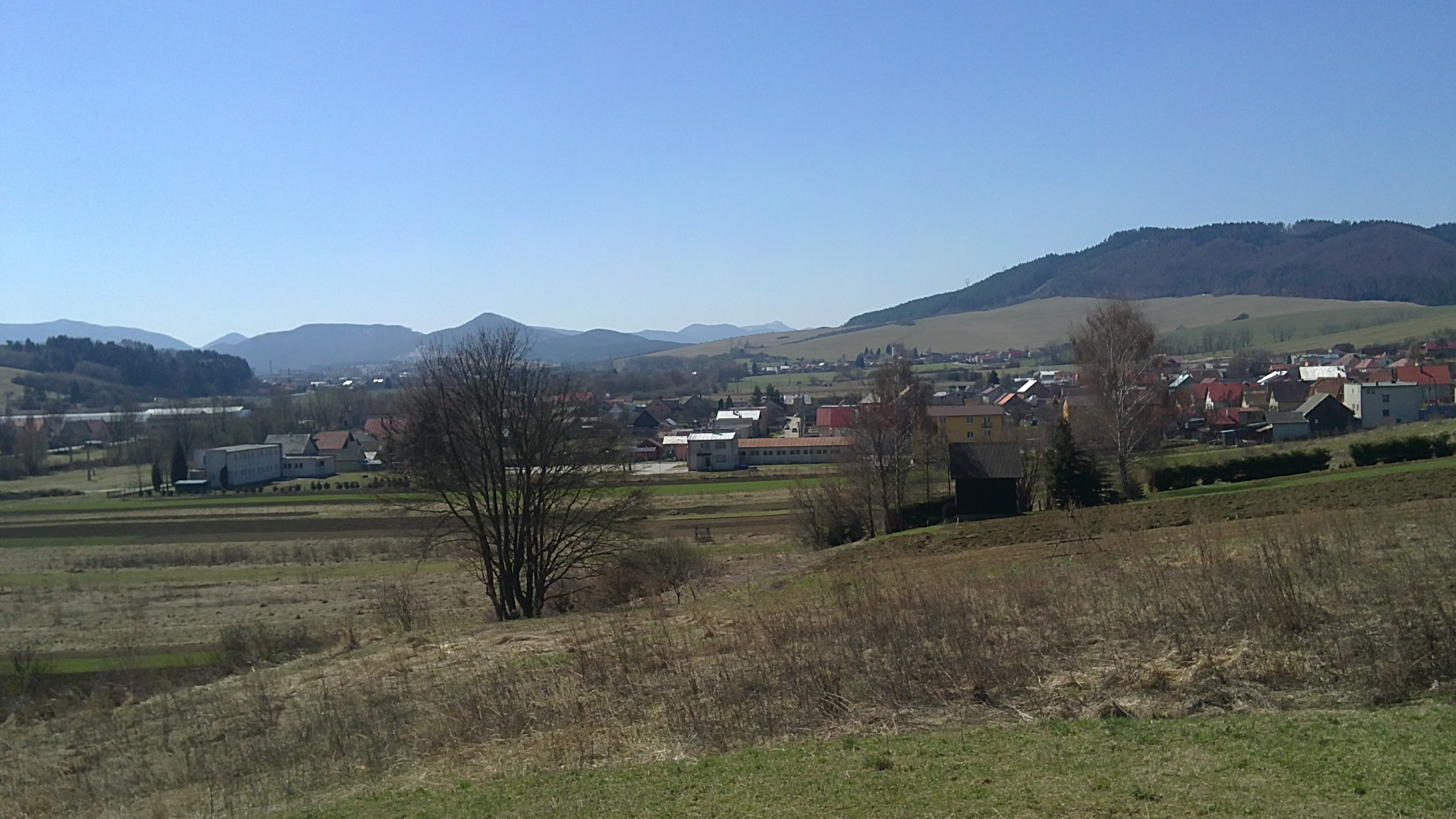 Obec Zbynov